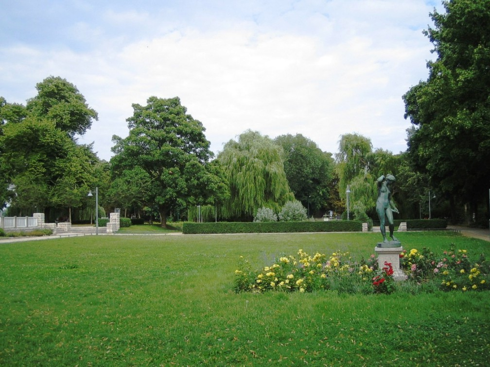 Berlin-Spandau, Wröhmännerpark. Teilansicht mit Statue der Diana.